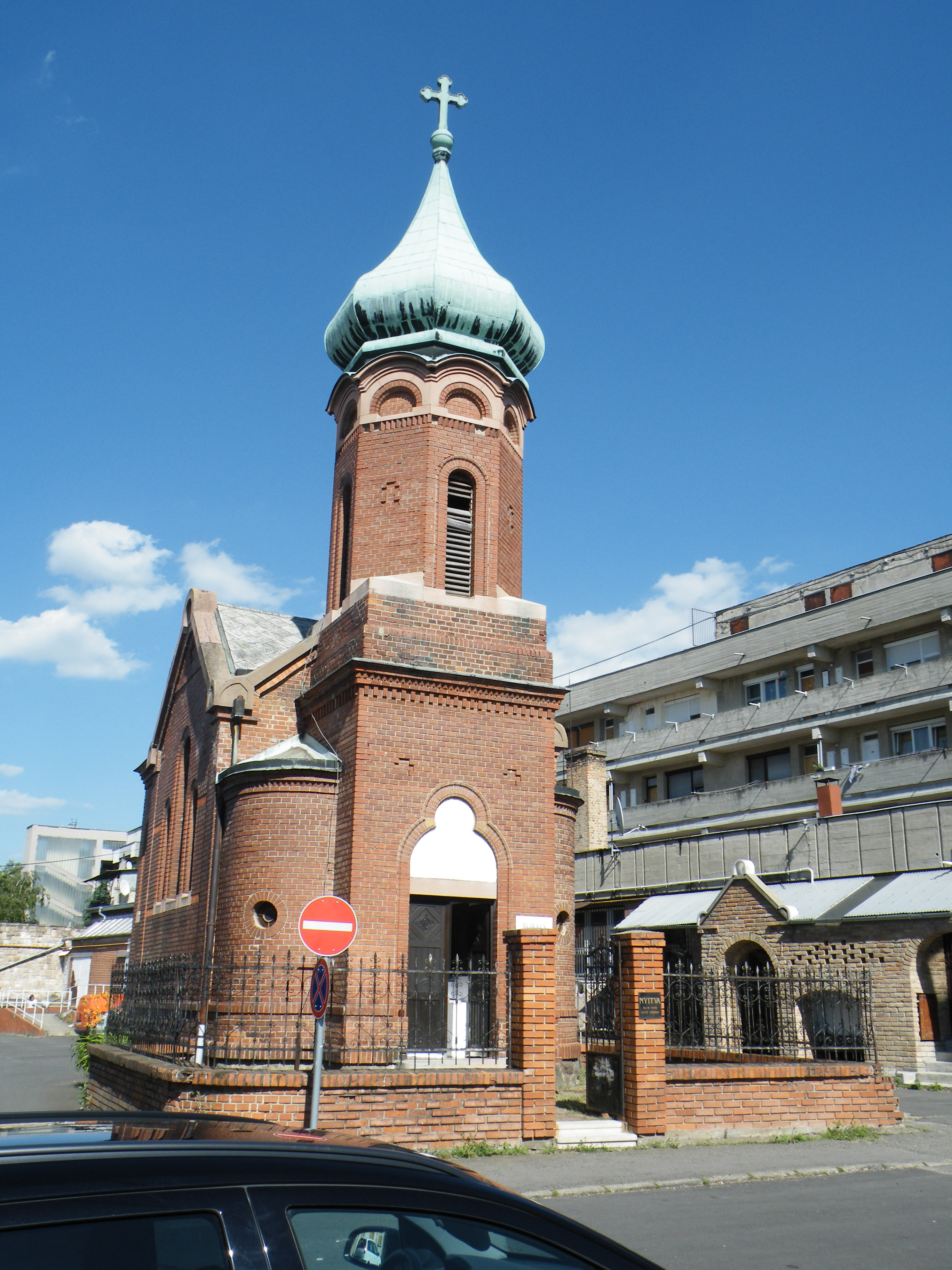 A Szerbtemplom kiállítóterem a Szerb utcában This is a photo of a monument in Hungary, Identifier: 6518